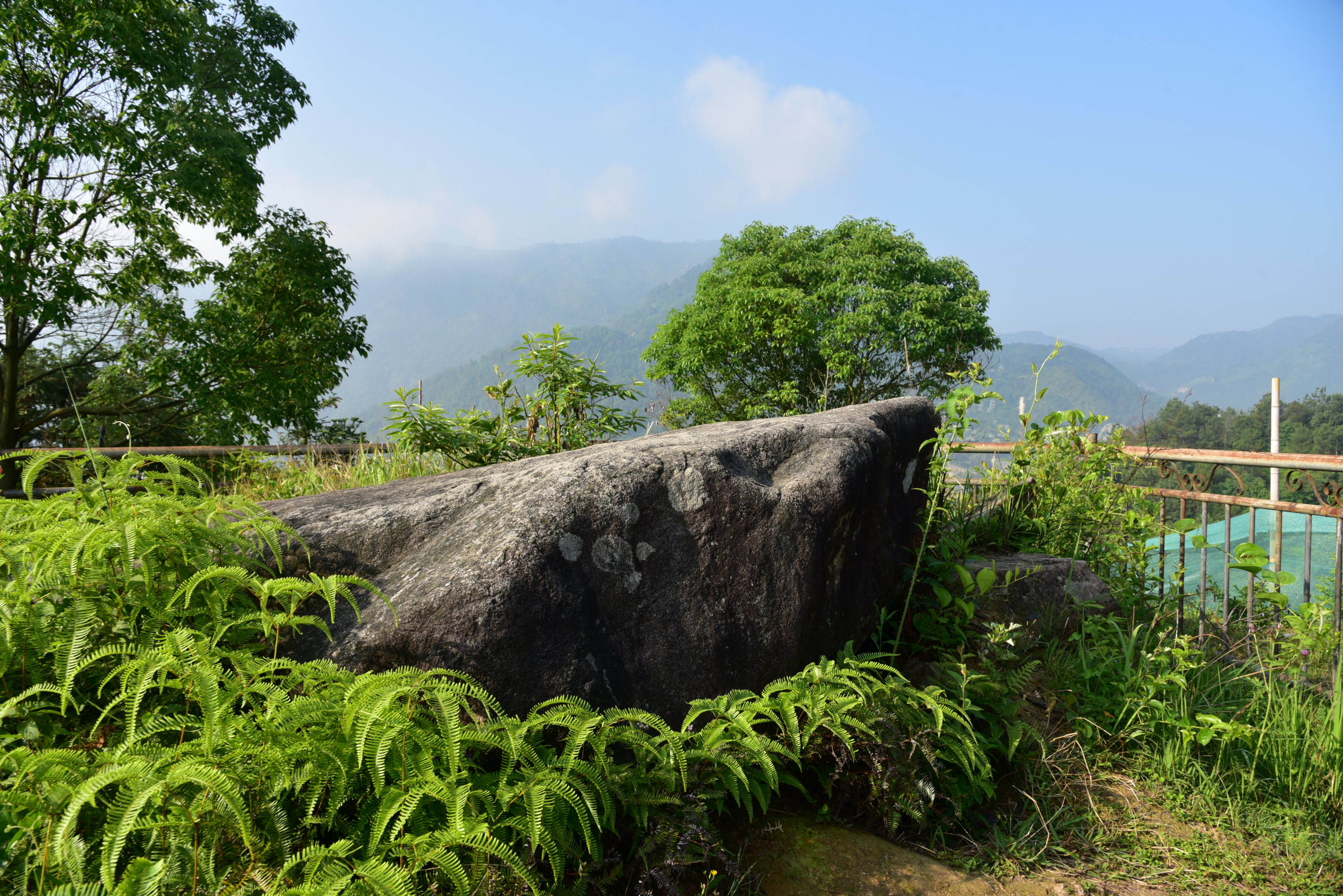 中文（中国大陆）: 棋盘山石棚墓，是全国重点文物保护单位浙南石棚墓群的一部分